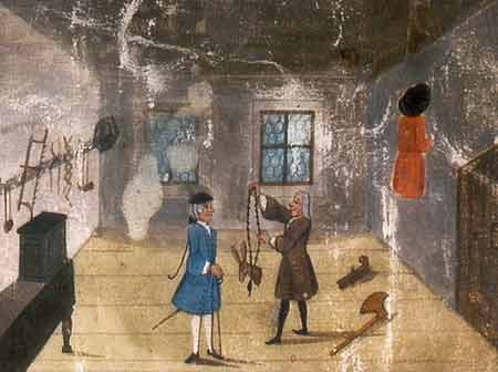 Deposition, Stammbuchblatt Jena 1740, Rechte abgelaufen, Public Domain